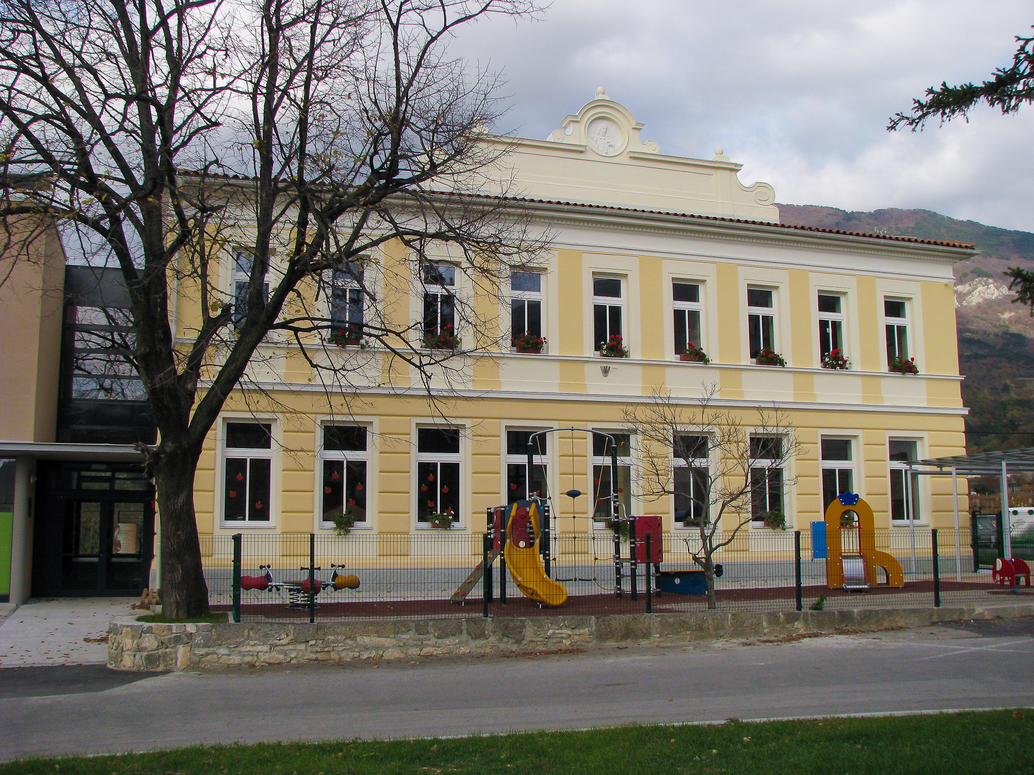 Osnovna šola Vrhpolje. Stavba je bila po avstrijskem načrtu zgrajena leta 1903. Krasi jo relief Kristusove glave v atiki.